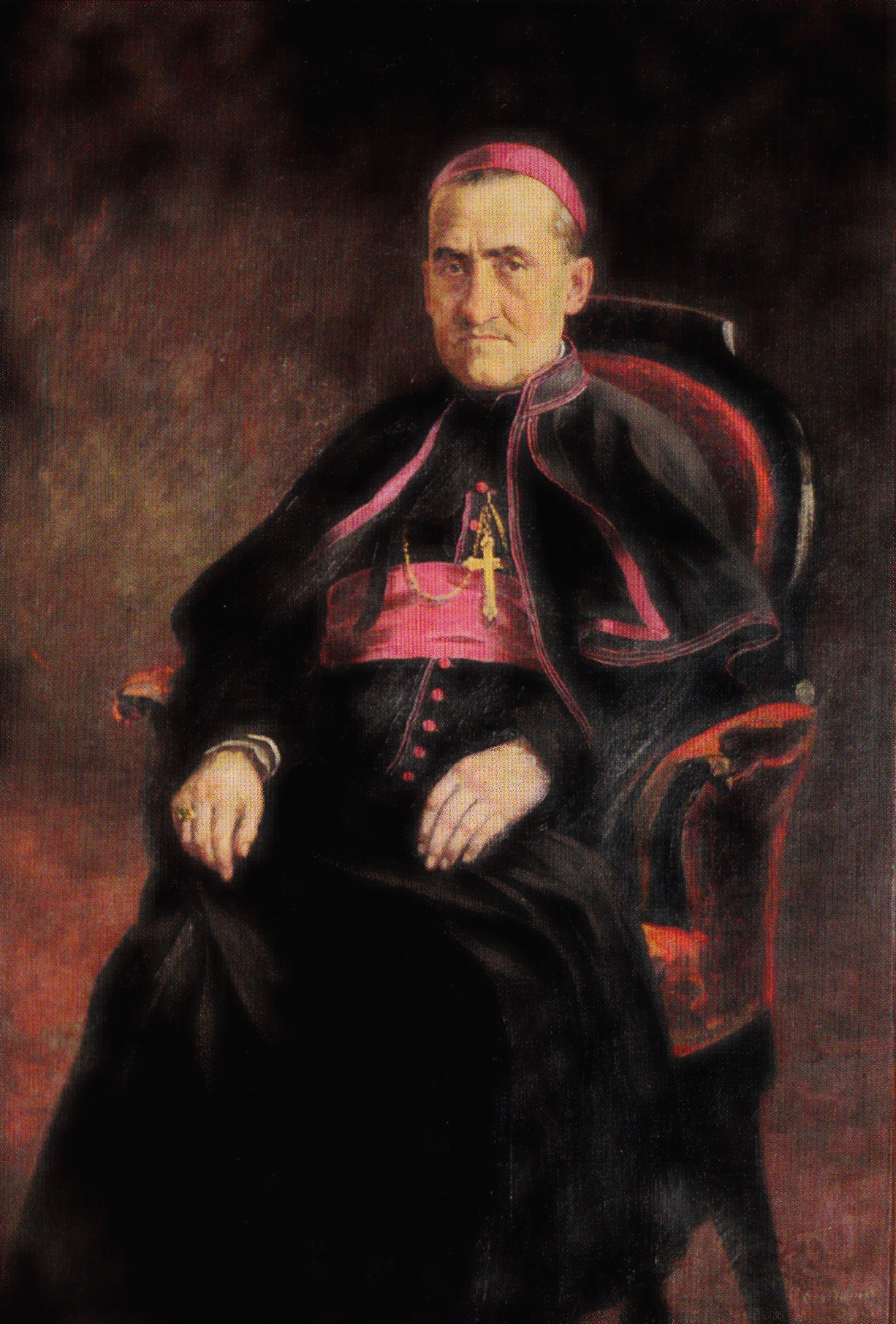 Federico Gonzáles Suárez, arzobispo de Quito y diputado de la República del Ecuador. Óleo sobre lienzo del artista César Villacrés (1906).